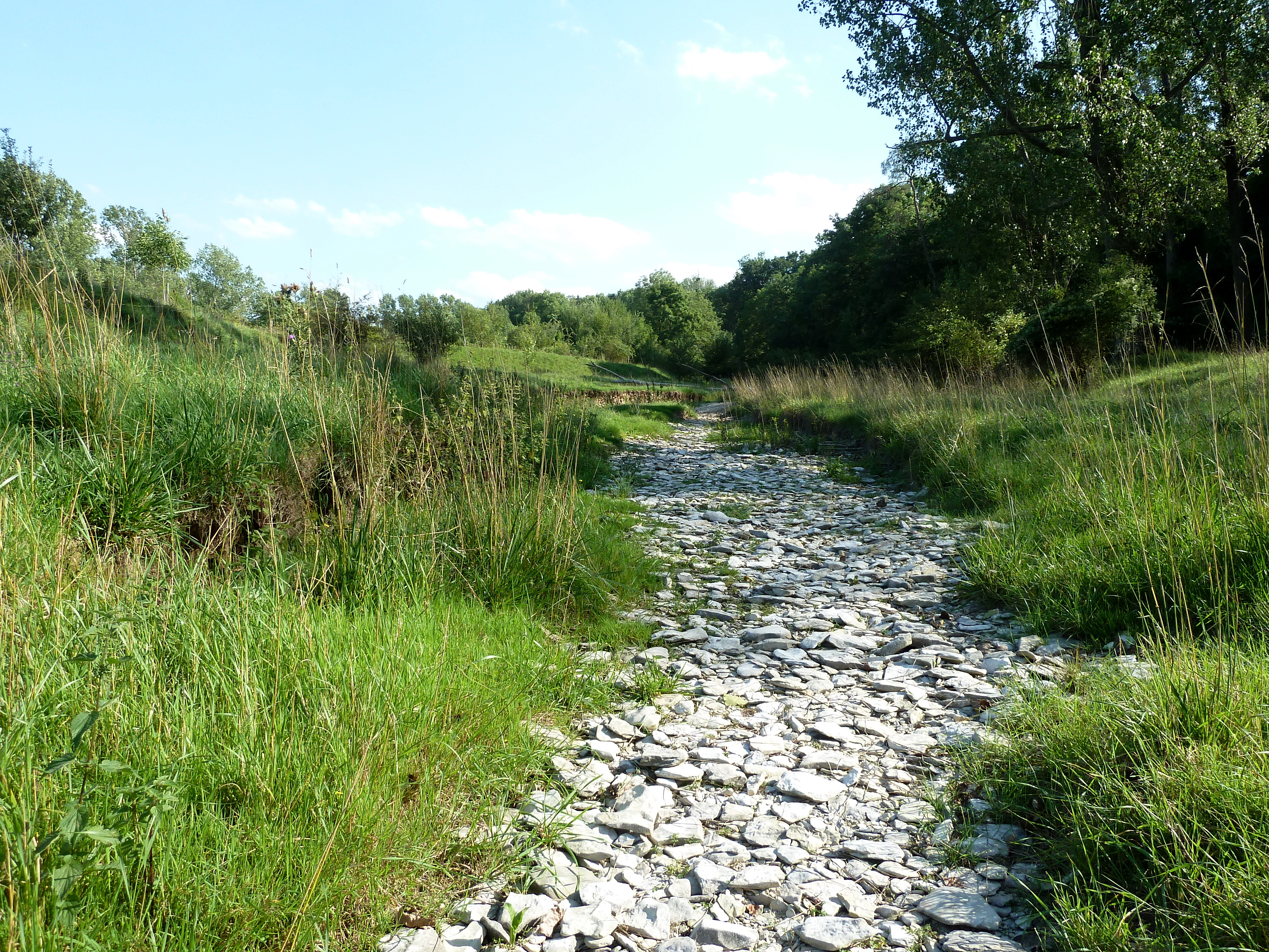 Trockenes Flussbett der Pöppelsche bei Eikeloh.